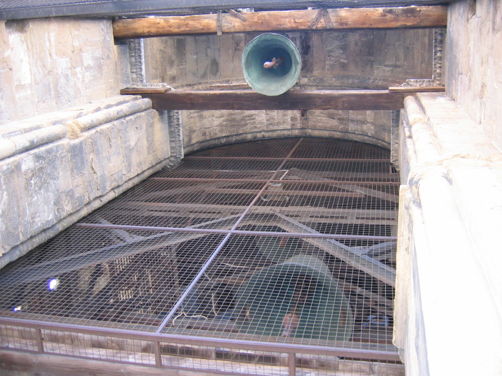 Glockenstuhl, Dom zu Florenz.